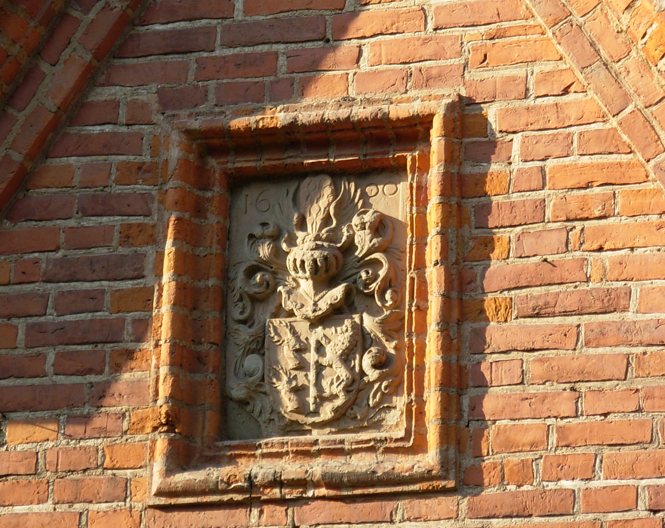 Herbas ant Raudonės pilies sienos